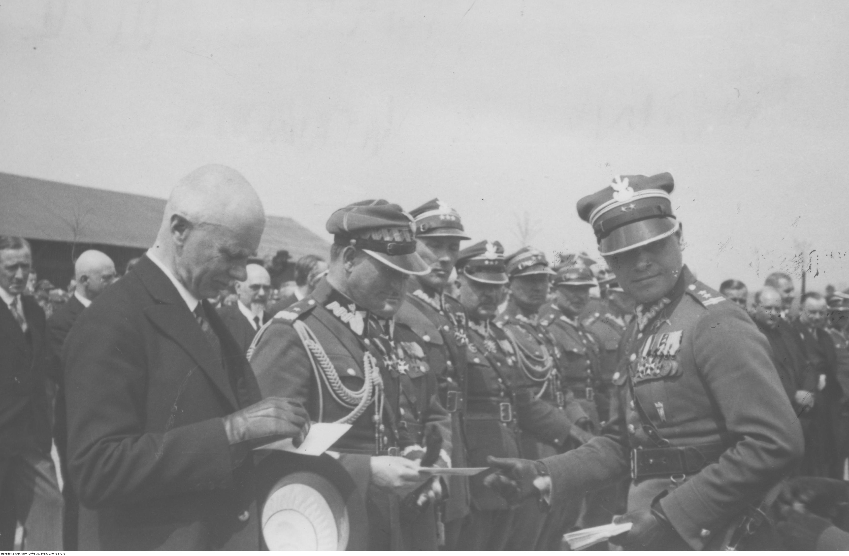 Święto 2 pułku lotniczego w Krakowie - wręczenie odznak pułkowych przez ppłk Edwarda Lewandowskiego; maj 1931 r. Koncern Ilustrowany Kurier Codzienny - Archiwum Ilustracji. Sygnatura: 1-W-1571-9